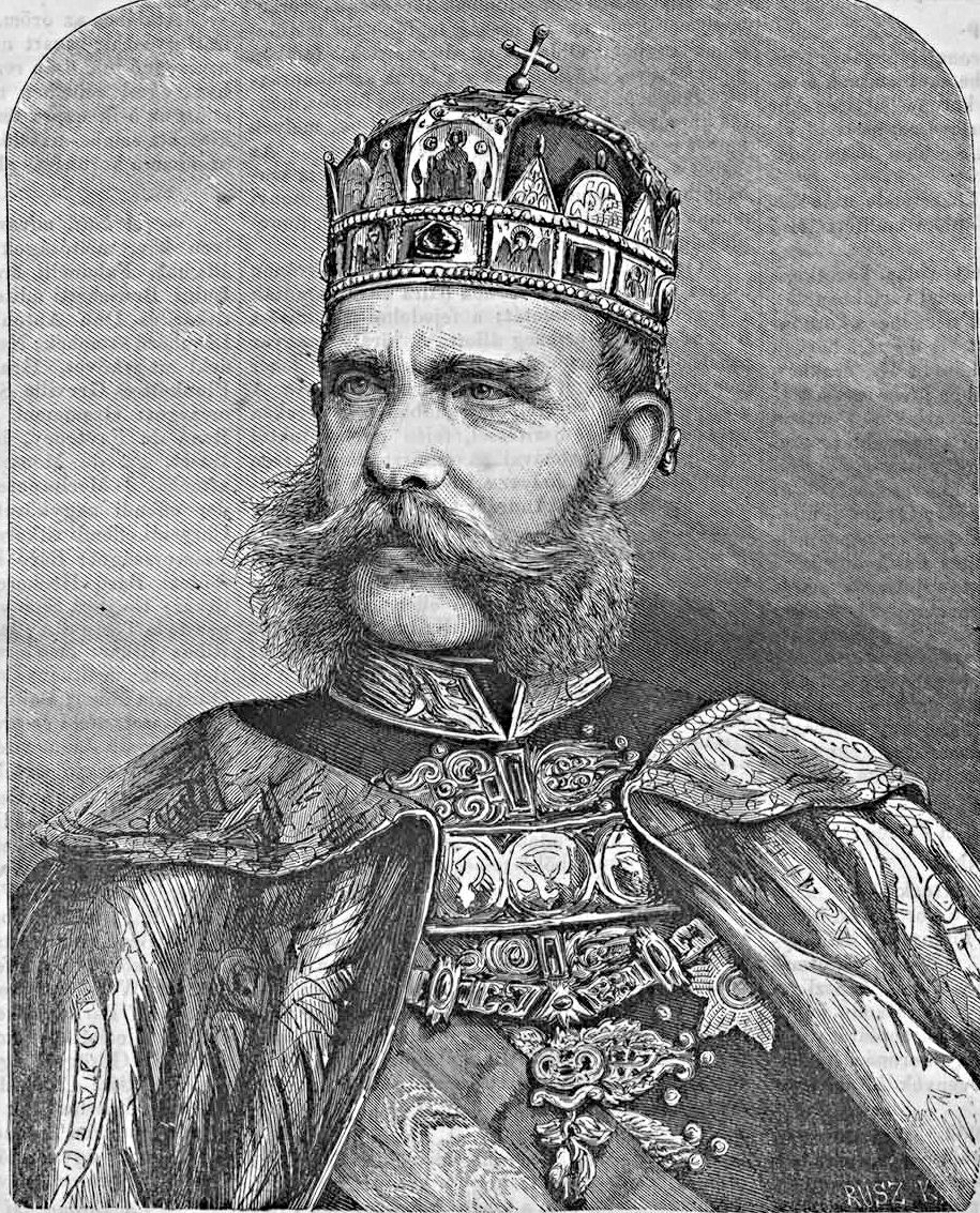 Franjo Josip I. , hrvatsko-ugarski kralj i austrijski car